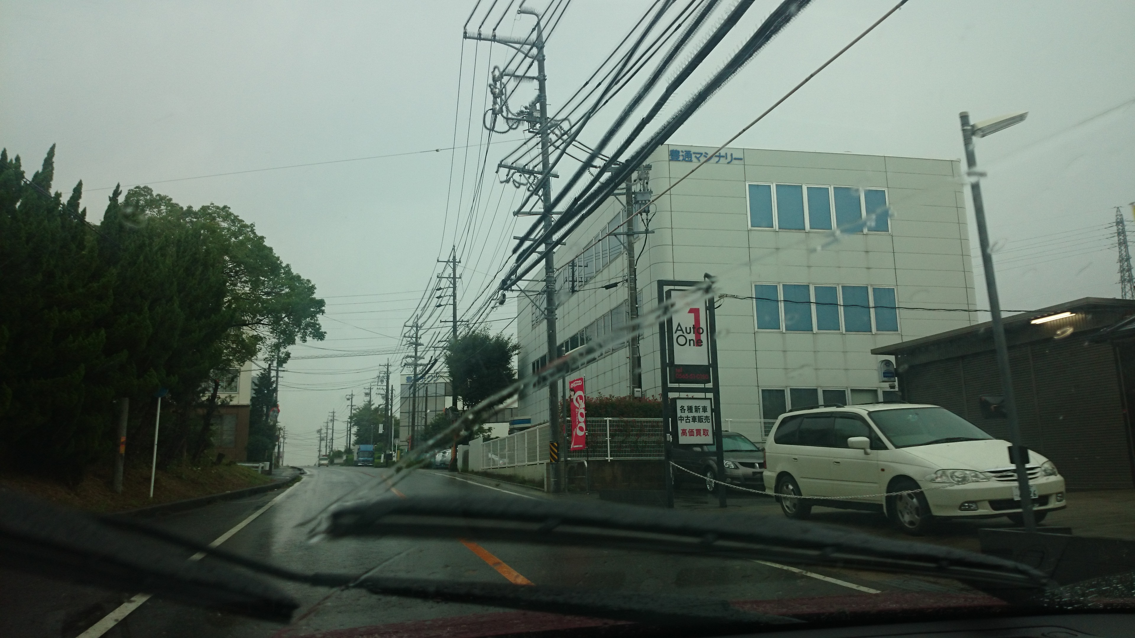 豊通マシナリー旧本社（現堤支店）